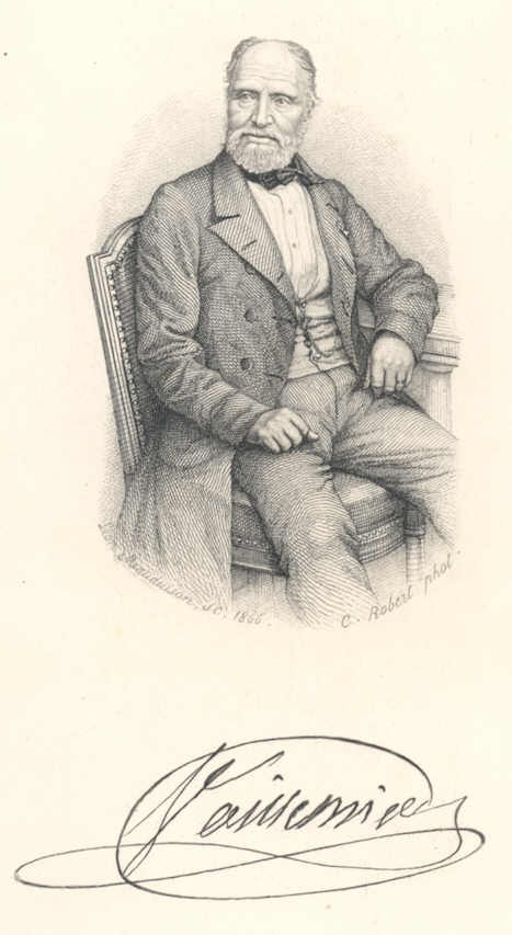 Le docteur en médécine Jean-Baptiste-Marie-Joseph Voillemier, né en 1787 à Chaumont (Haute-Marne) et décédé à Senlis en avril 1865, fut le président fondateur du Comité Archéologique de Senlis.